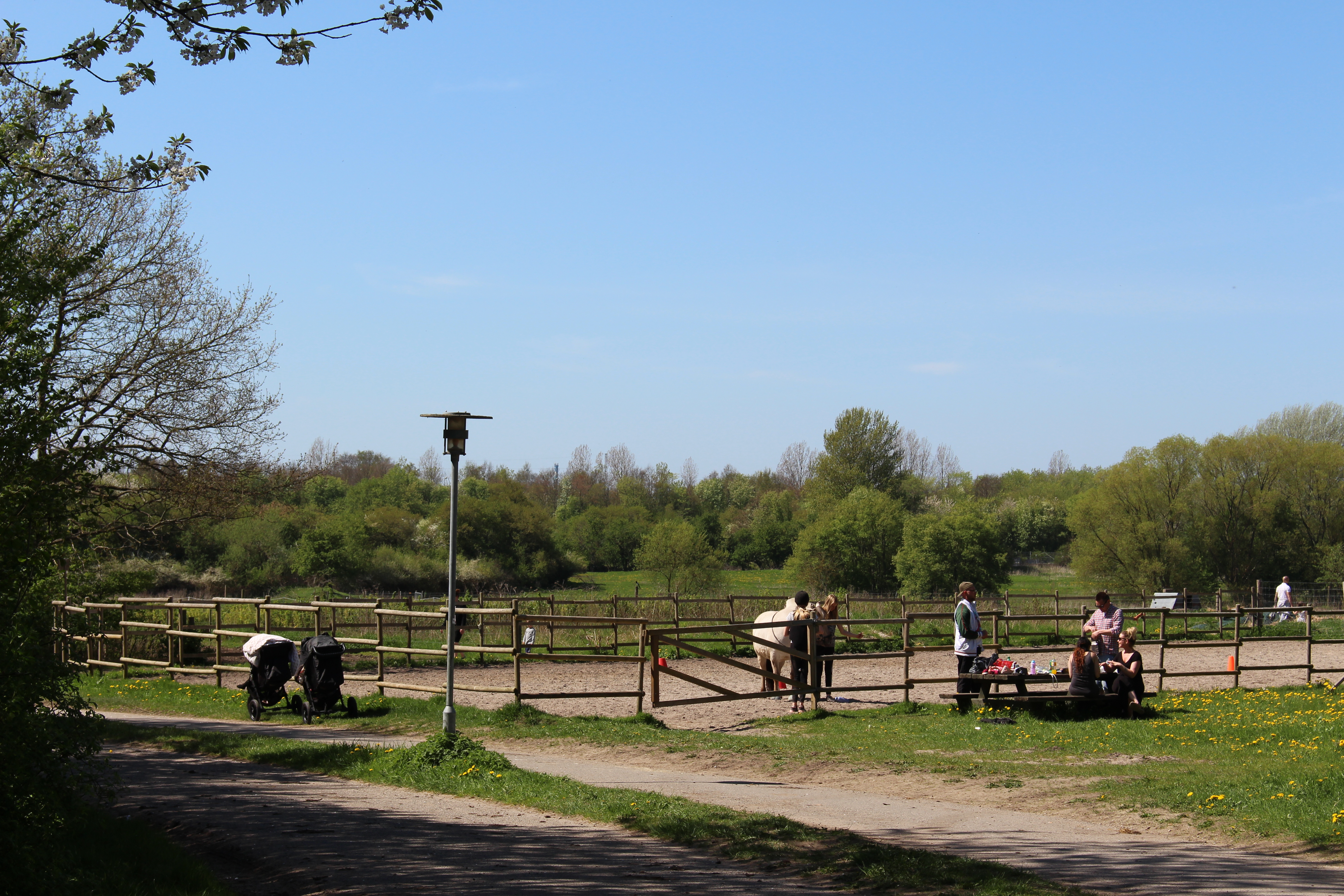 Hestefold ved Toftegården